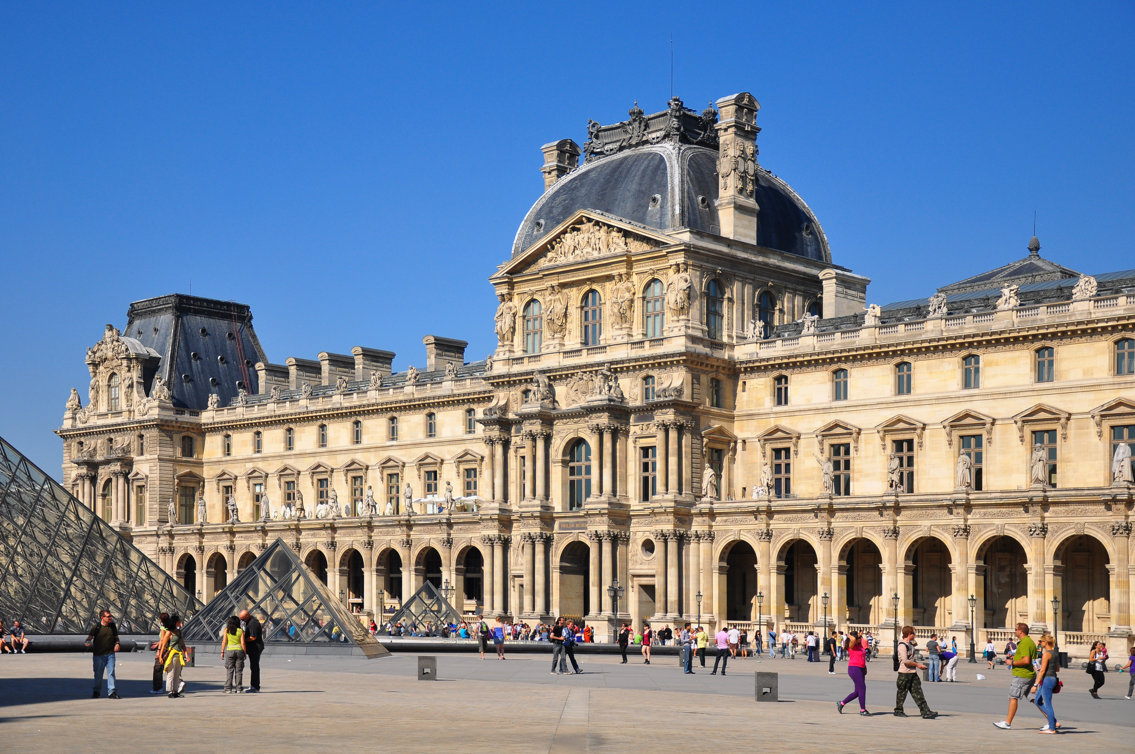 Louvre Museum